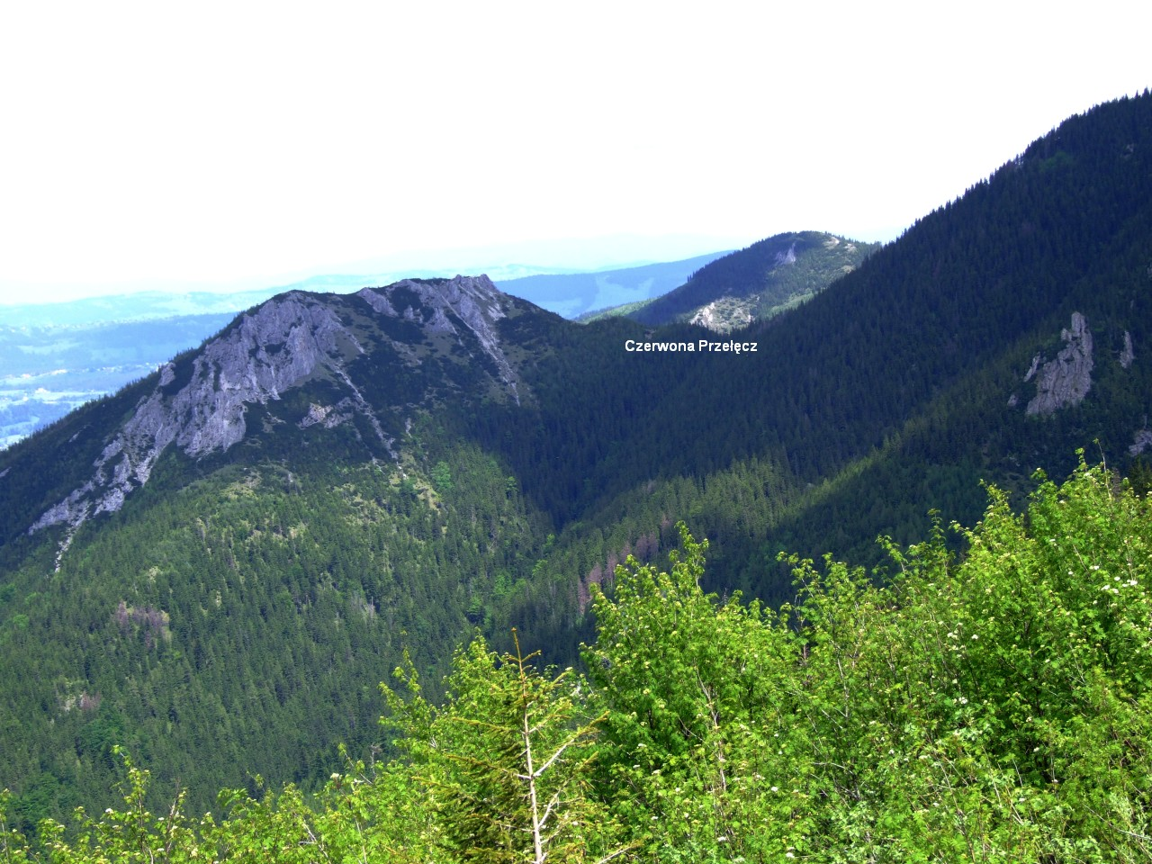 Sarnia Skała i Czerwona Przełęcz, w głębi Krokiew. Widok z Grzybowca